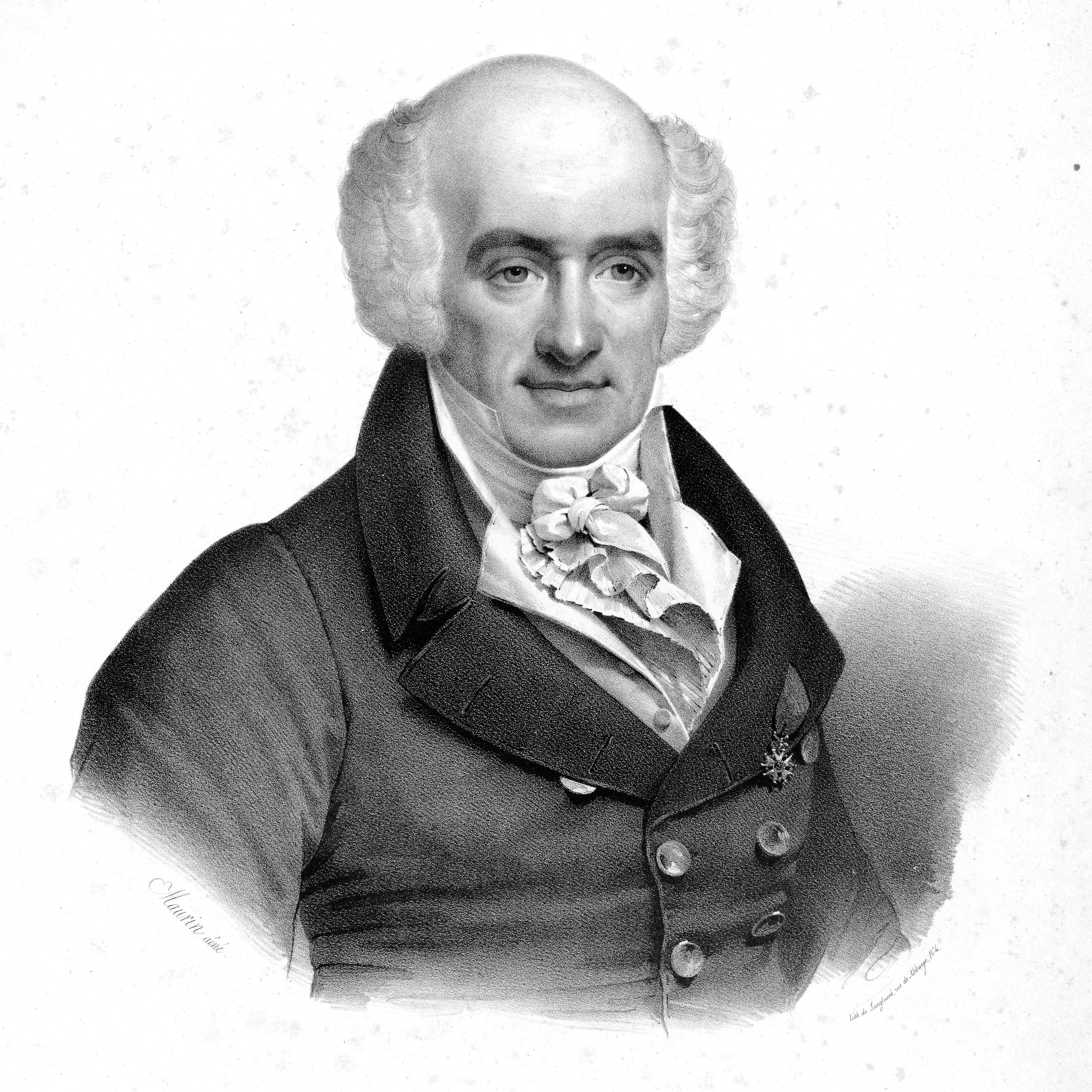 Depicted person: Giovanni Battista Viotti